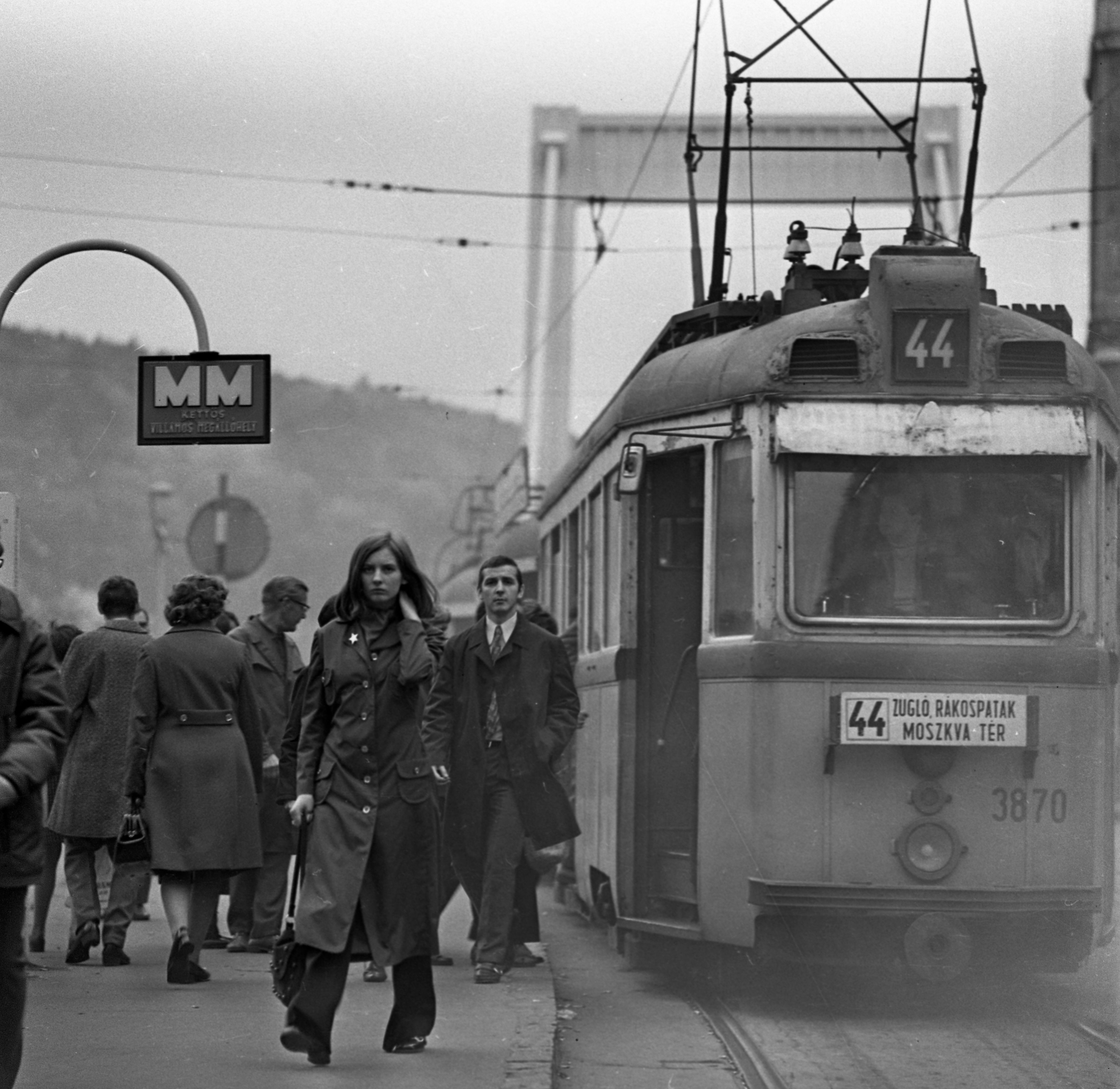 Erzsébet híd pesti hídfő, villamosmegálló a Váci utcánál. Location: Hungary, Budapest V. Tags: tram, tram stop, Budapest Title: Erzsébet híd pesti hídfő, villamosmegálló a Váci utcánál.